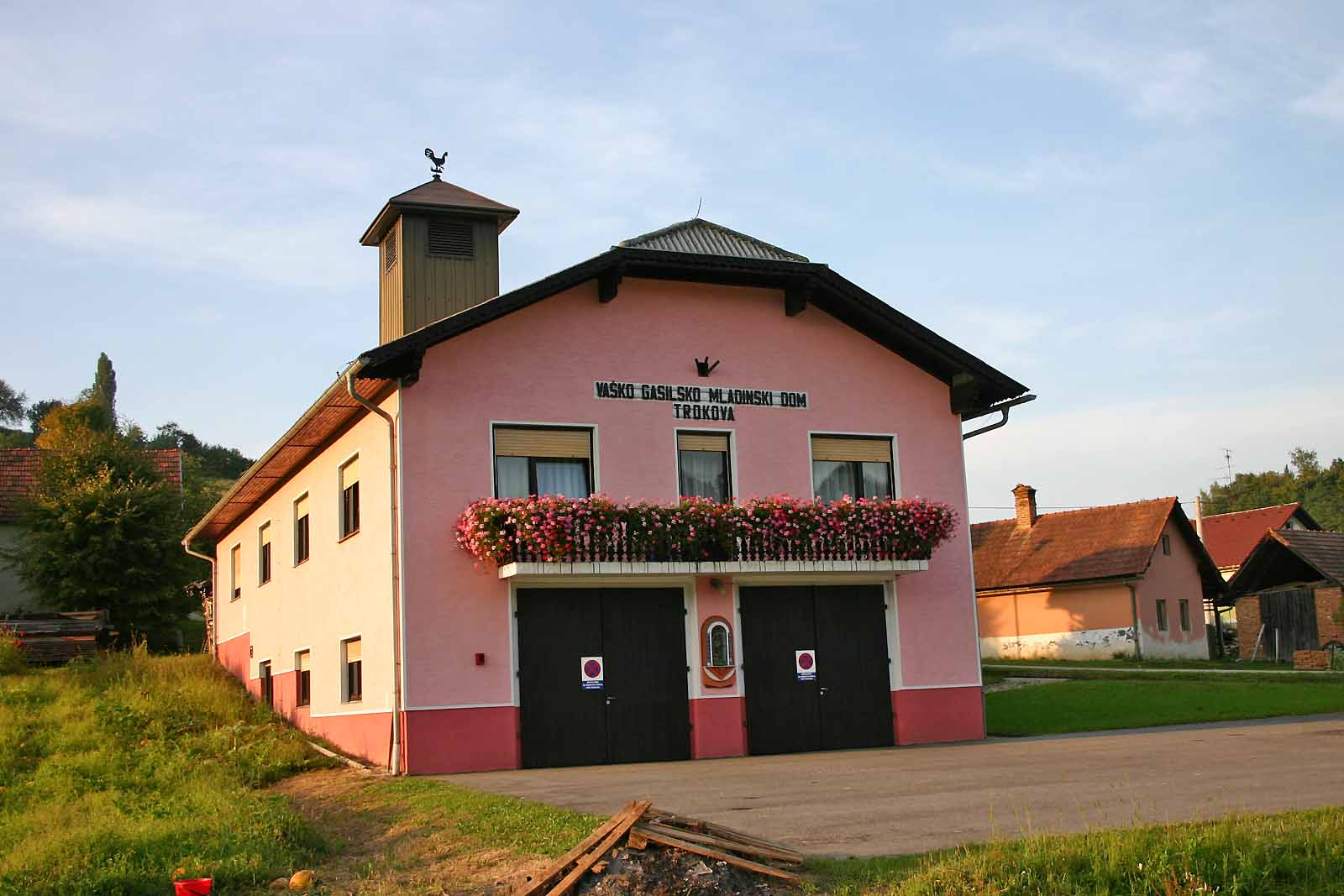 Prostovoljno gasilsko društvo Trdkova. Volunteer fire Trdkova. Freiwillige Feuerwehr Trdkova.